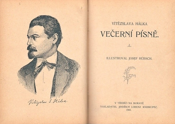 Vydání Večerních pésní z roku 1905